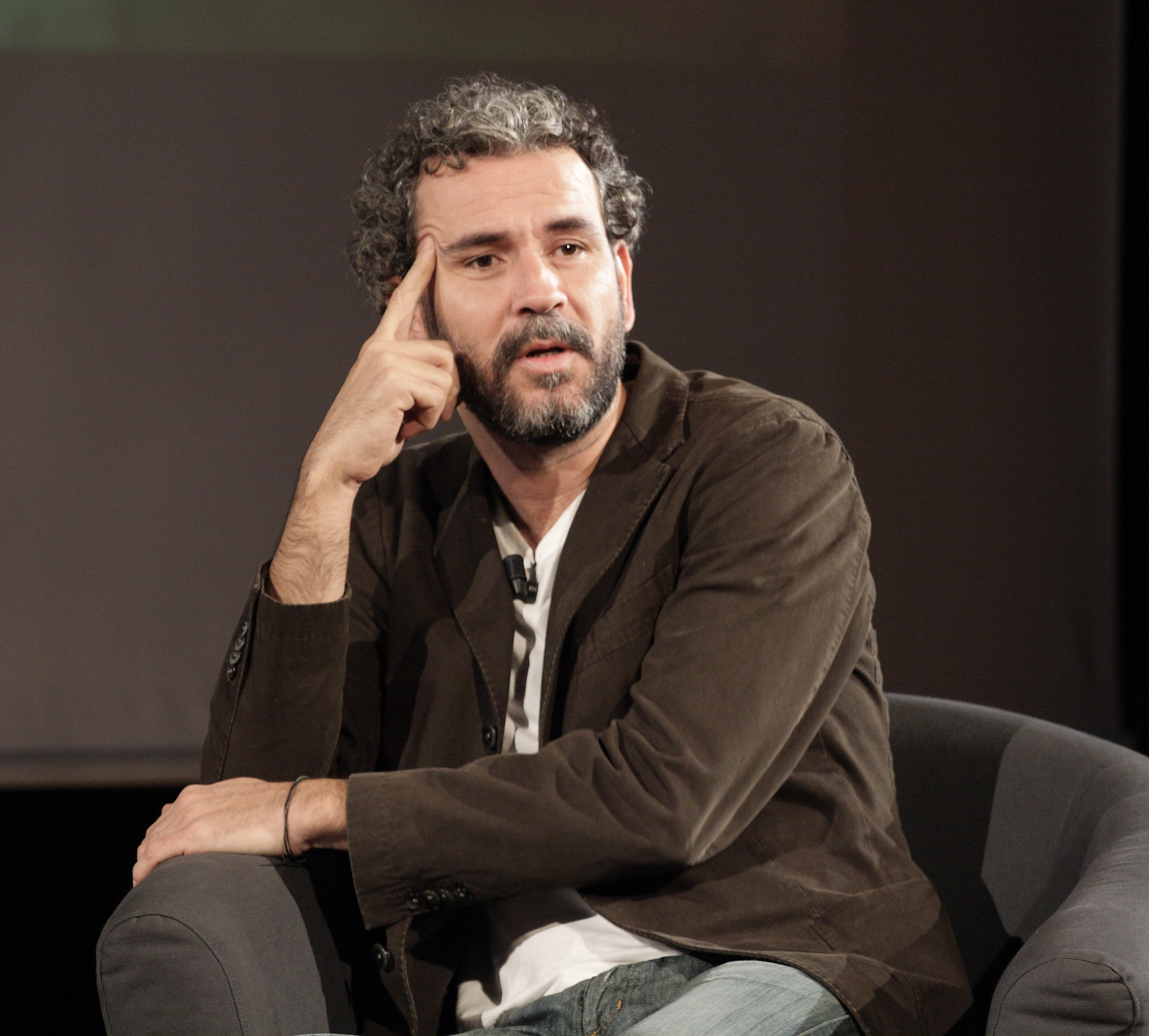 Willy Toledo en el programa Taller de Canal Plus en 2007